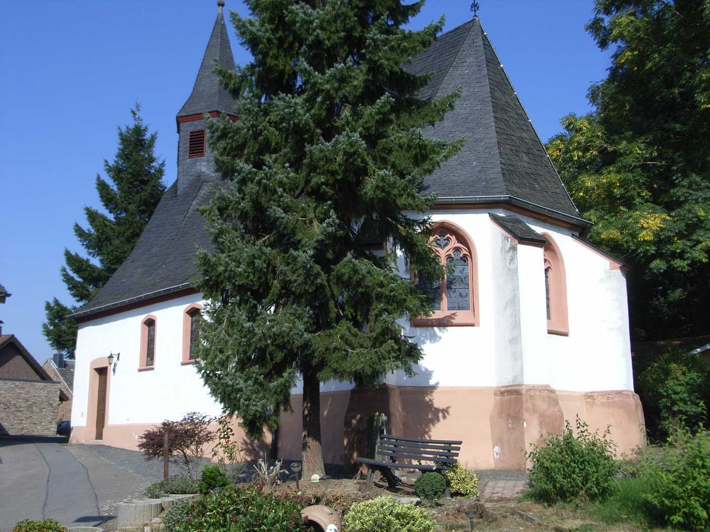 Bedburg-Grottenherten , Kapelle St. Margaretha